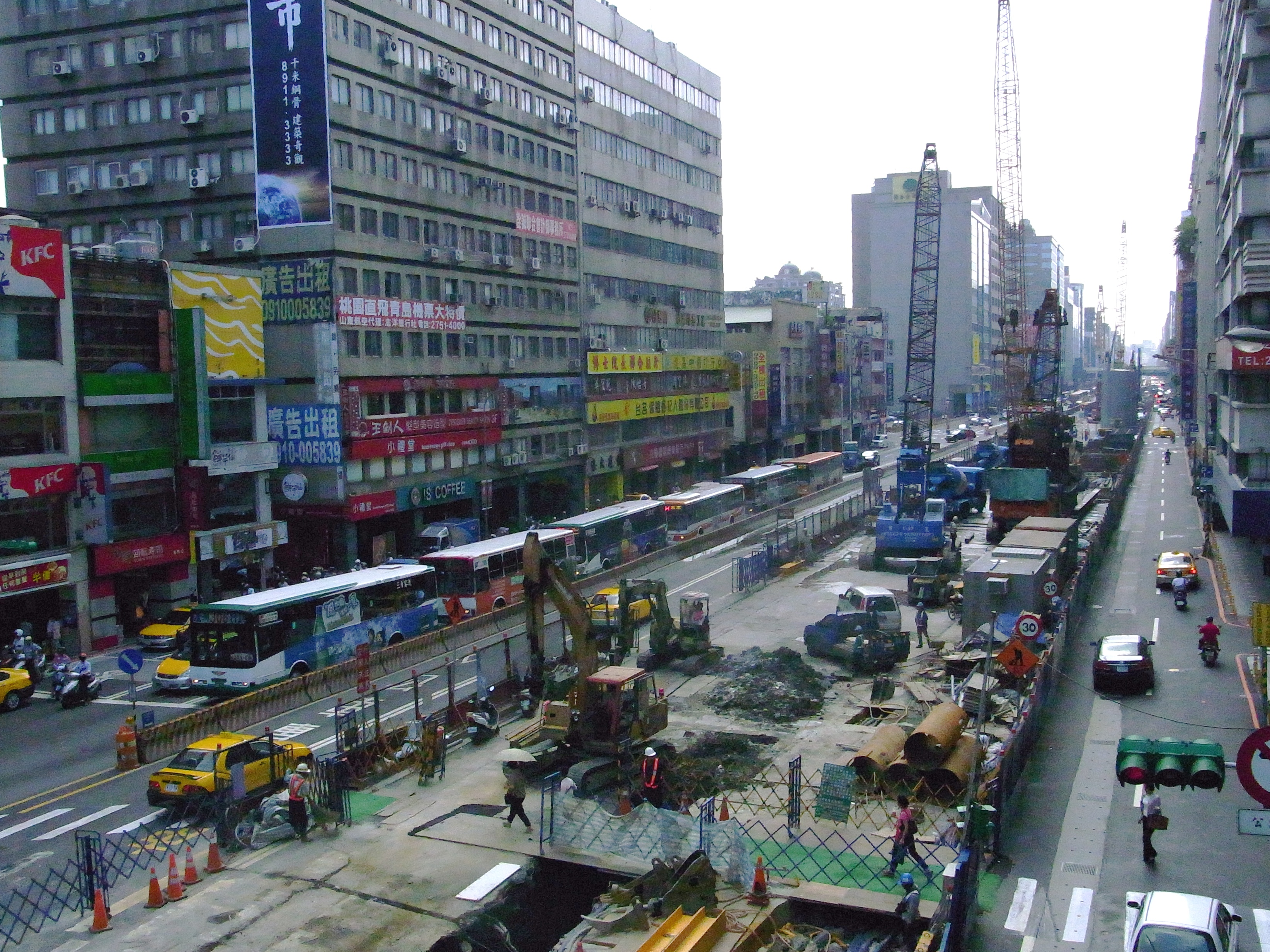 台北市中山區南京東路三段台北捷運松山線工地。